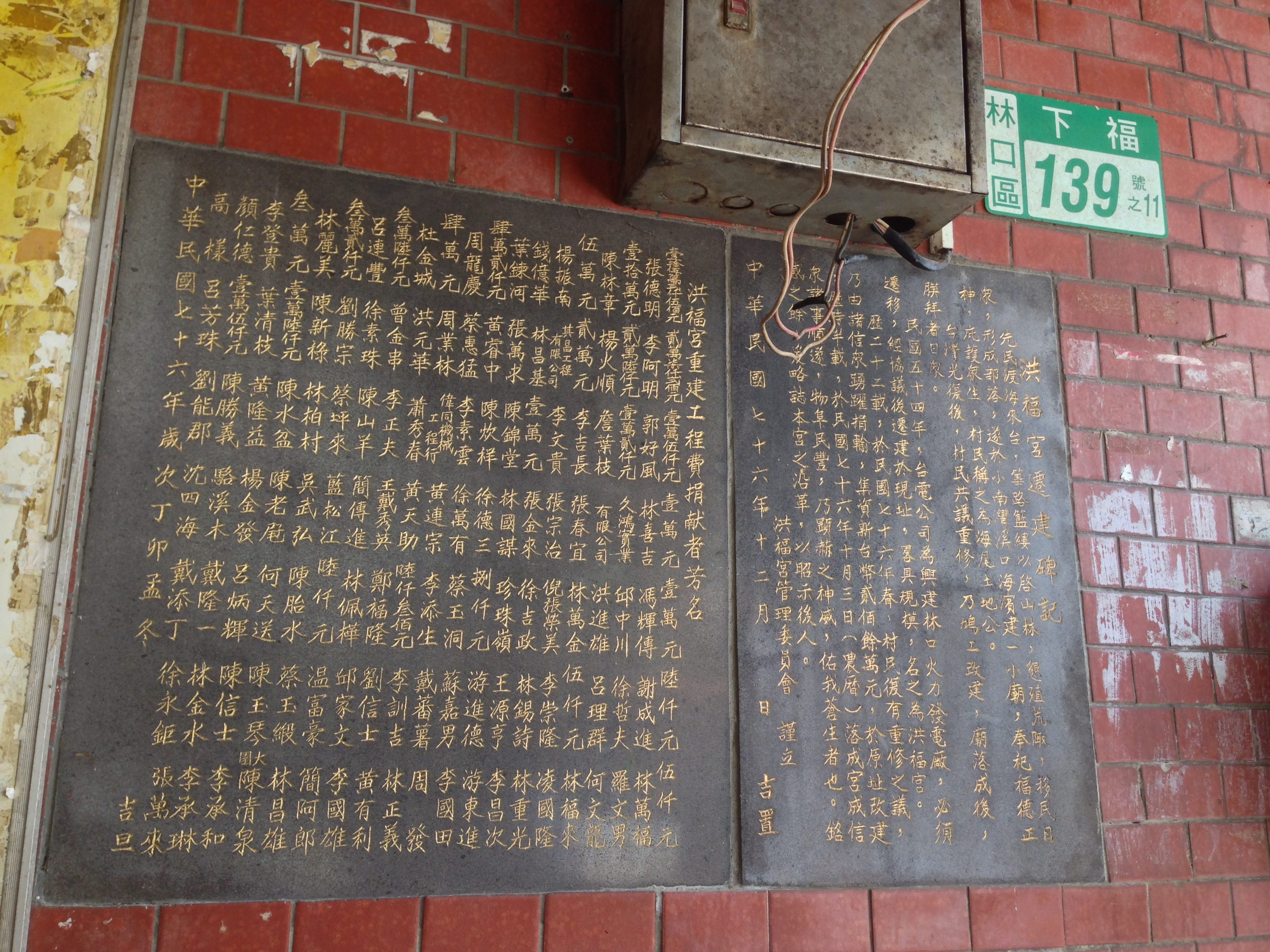 中文（台灣）: 洪福宮門牌與遷建碑記